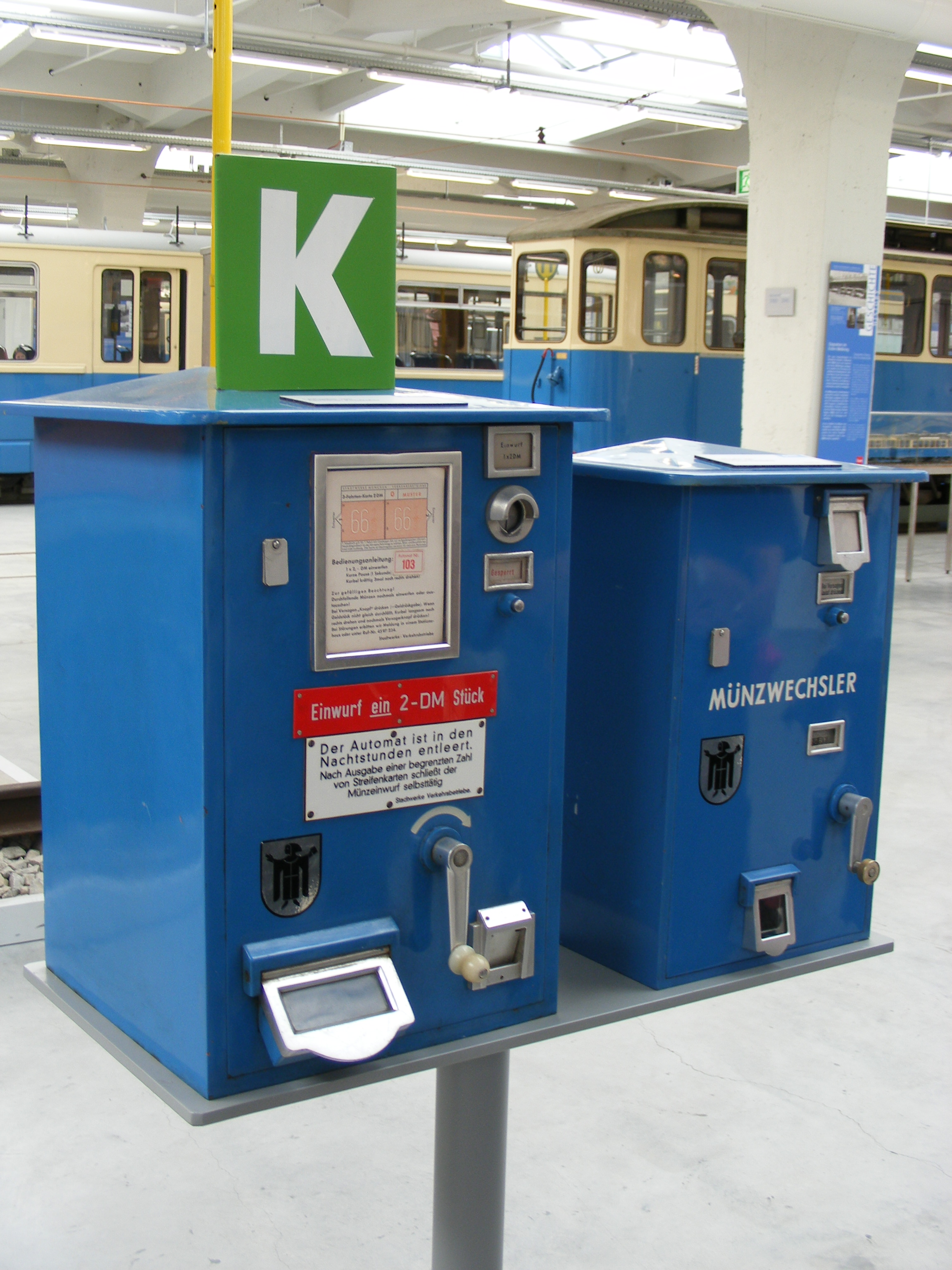 Fahrscheinverkaufsautomat und Münzwechsler der Stadtwerke München - Verkehrsbetriebe, ca. 1980 — Exponat im MVG Museum.